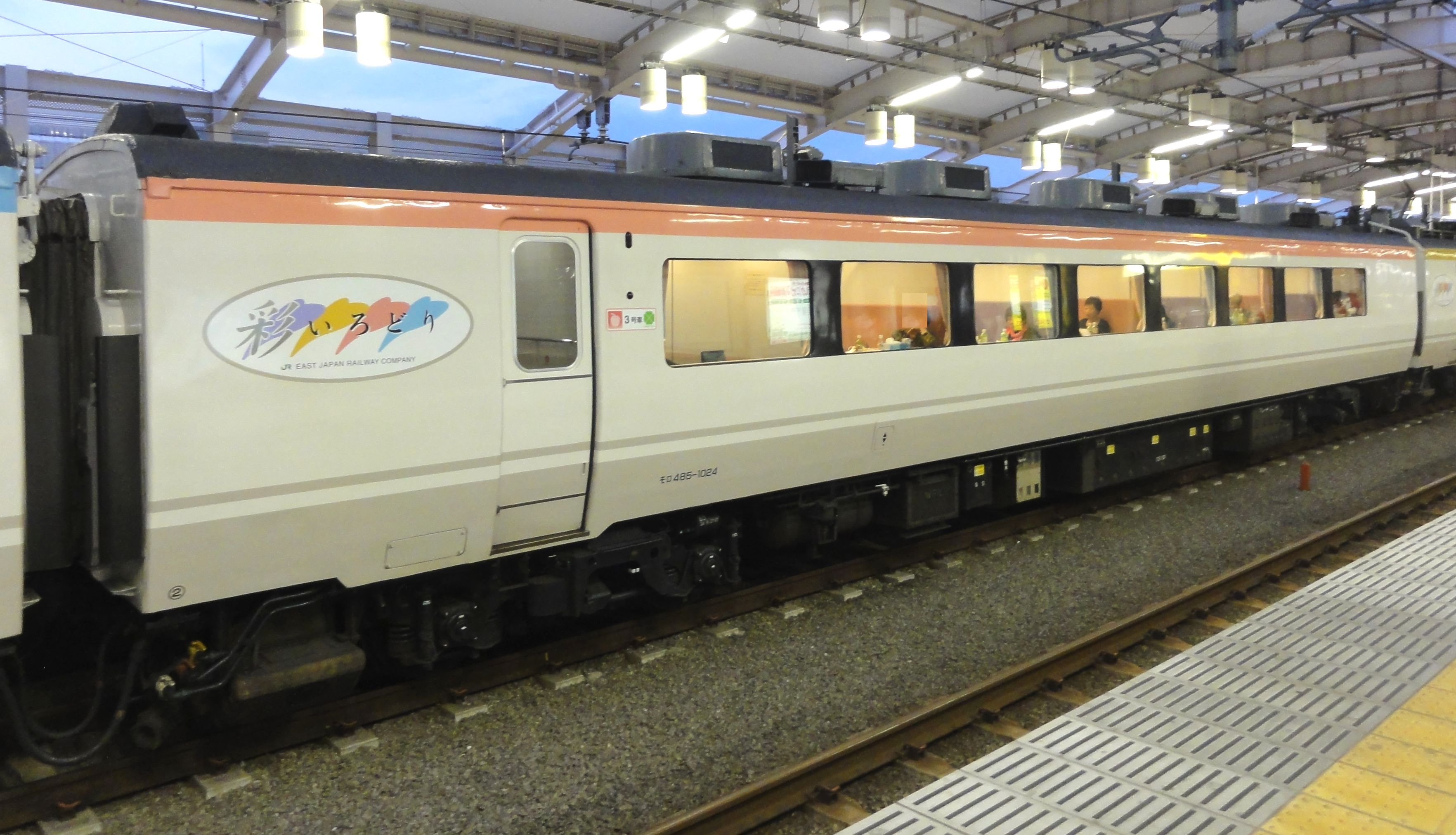 JR東日本 485系「彩（いろどり）」